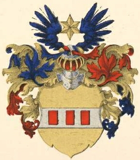 Pröbstingi suguvõsa aadlivapp